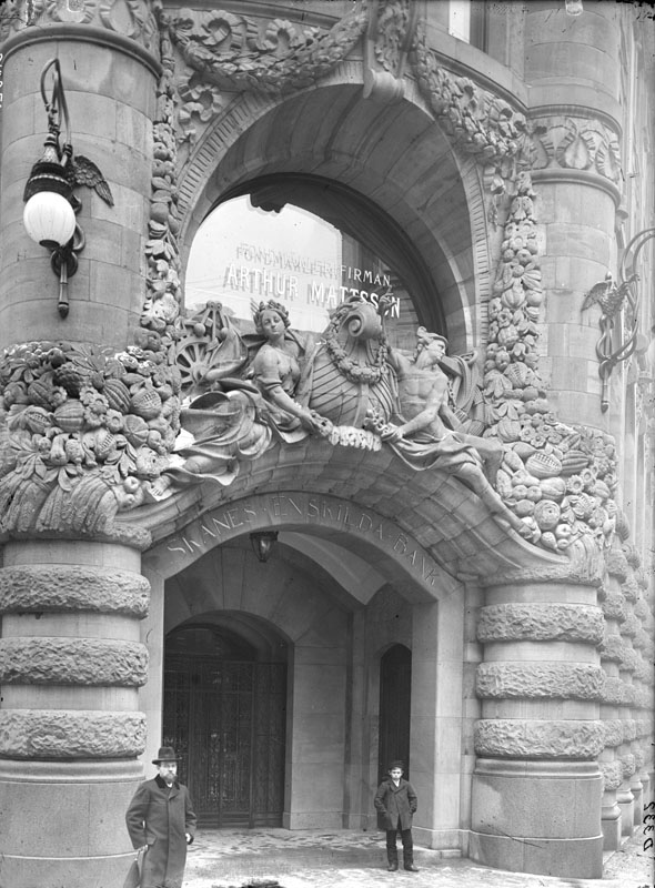 Drottninggatan 5. Skånes enskilda bank, portal, Tid: 1900 - 1910